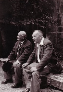 photo 1955